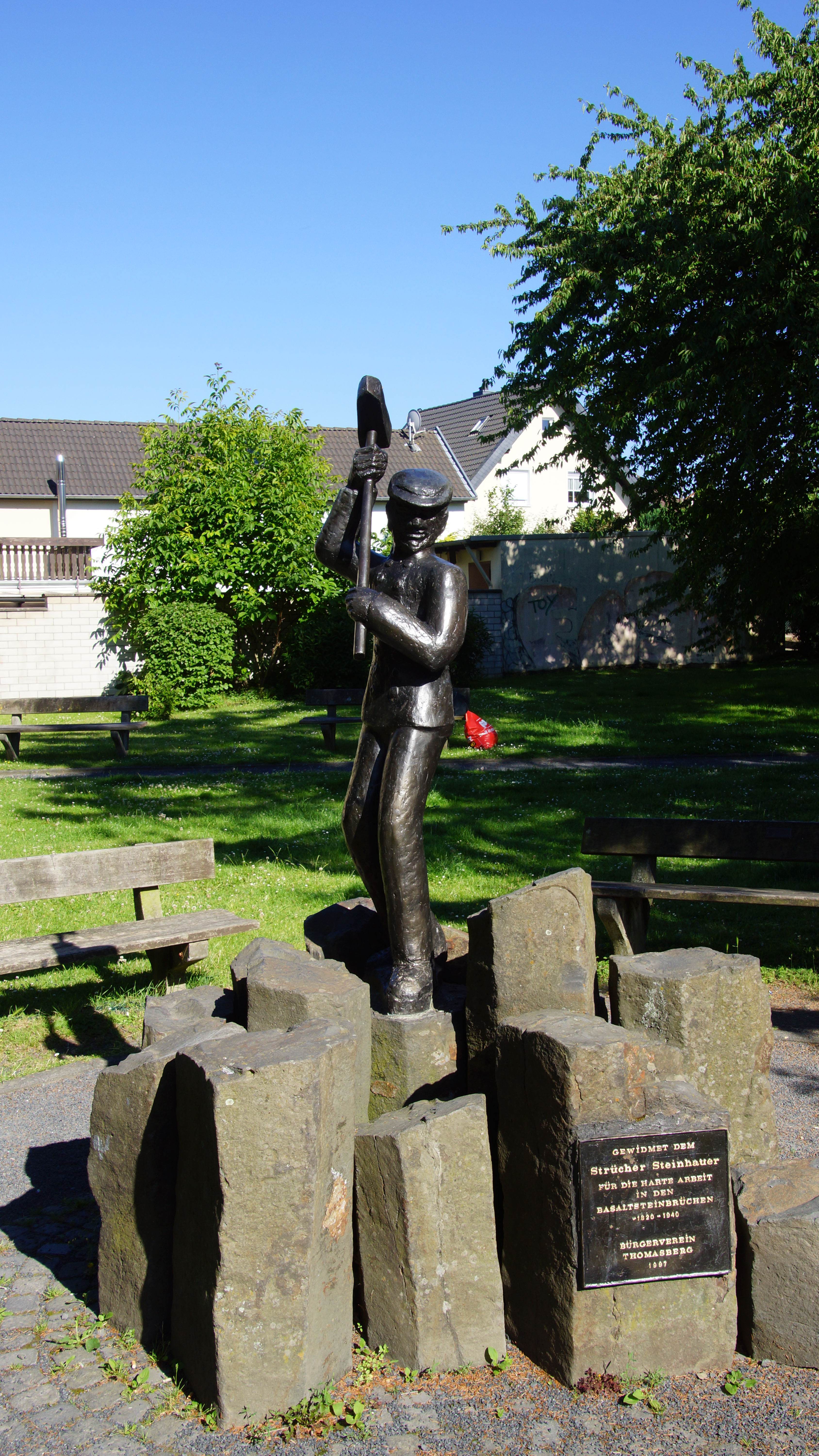 Steinhauer-Denkmal (1997), Ecke Wiesenstraße/Zum kleinen Ölberg („Dorfplatz“), Thomasberg, Stadt Königswinter. Bildhauerin: Sigrid Wenzel